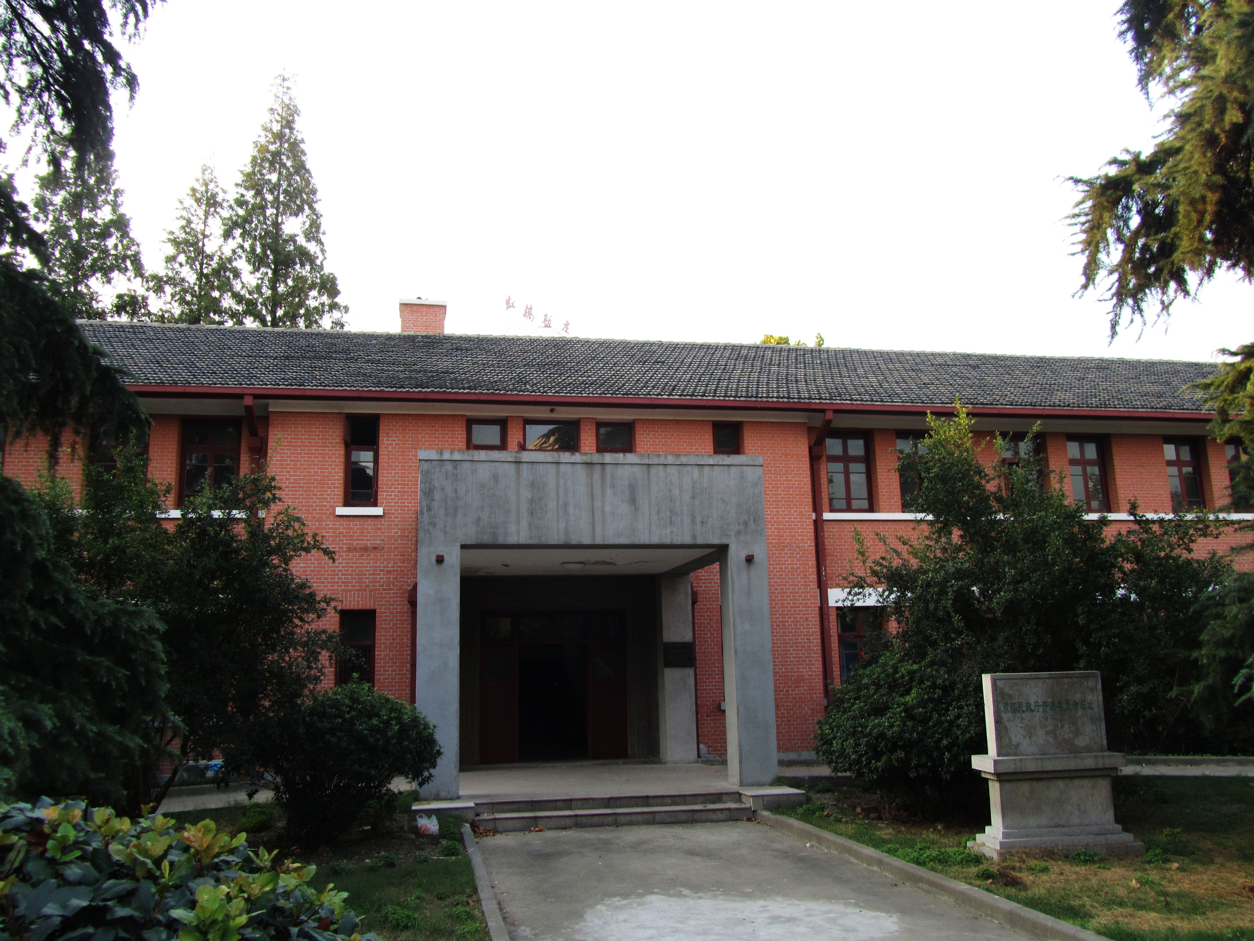 位于南京工业大学院内的原国民政府资源委员会旧址。